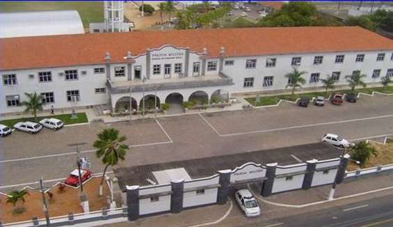 Quartel do Comando Geral da PMRN.